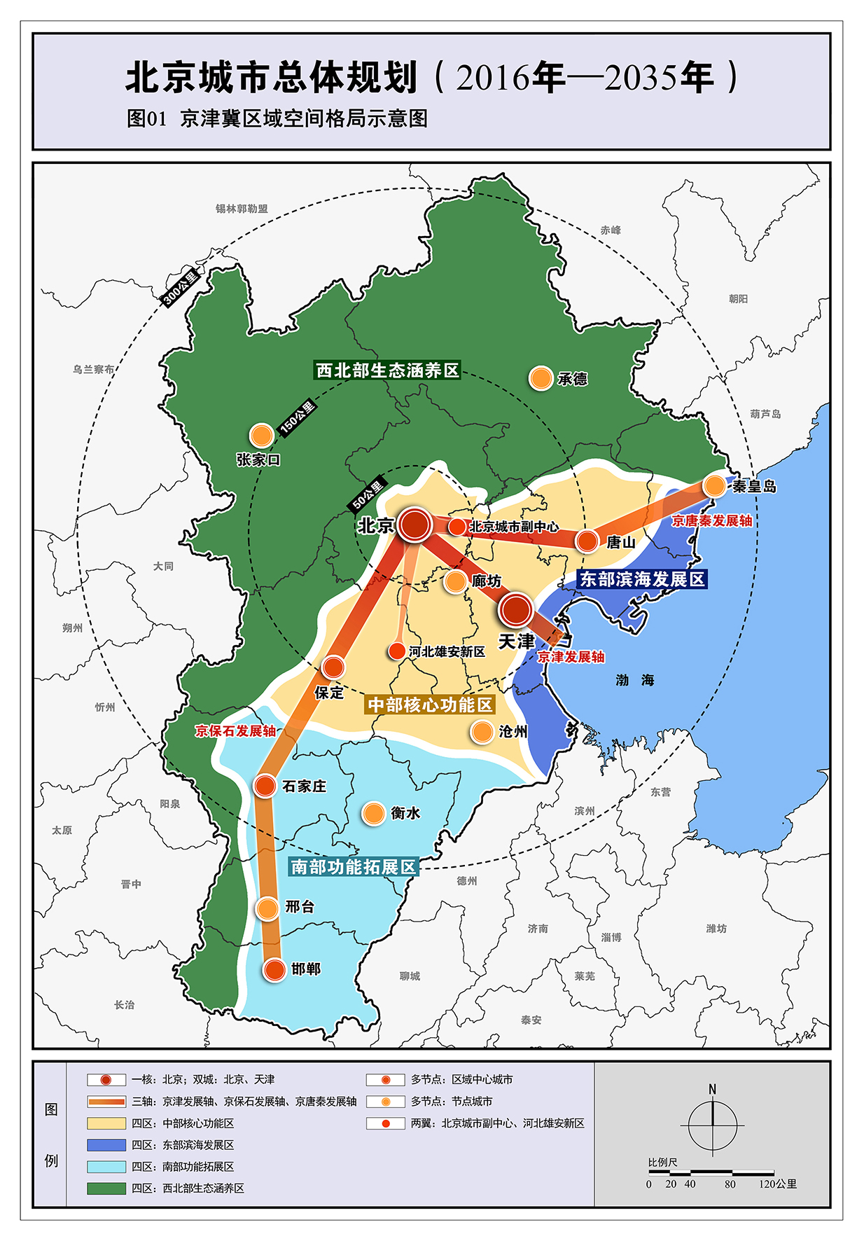 中文（中国大陆）: 北京城市总体规划（2016年－2035年）图01 京津冀区域空间格局示意图